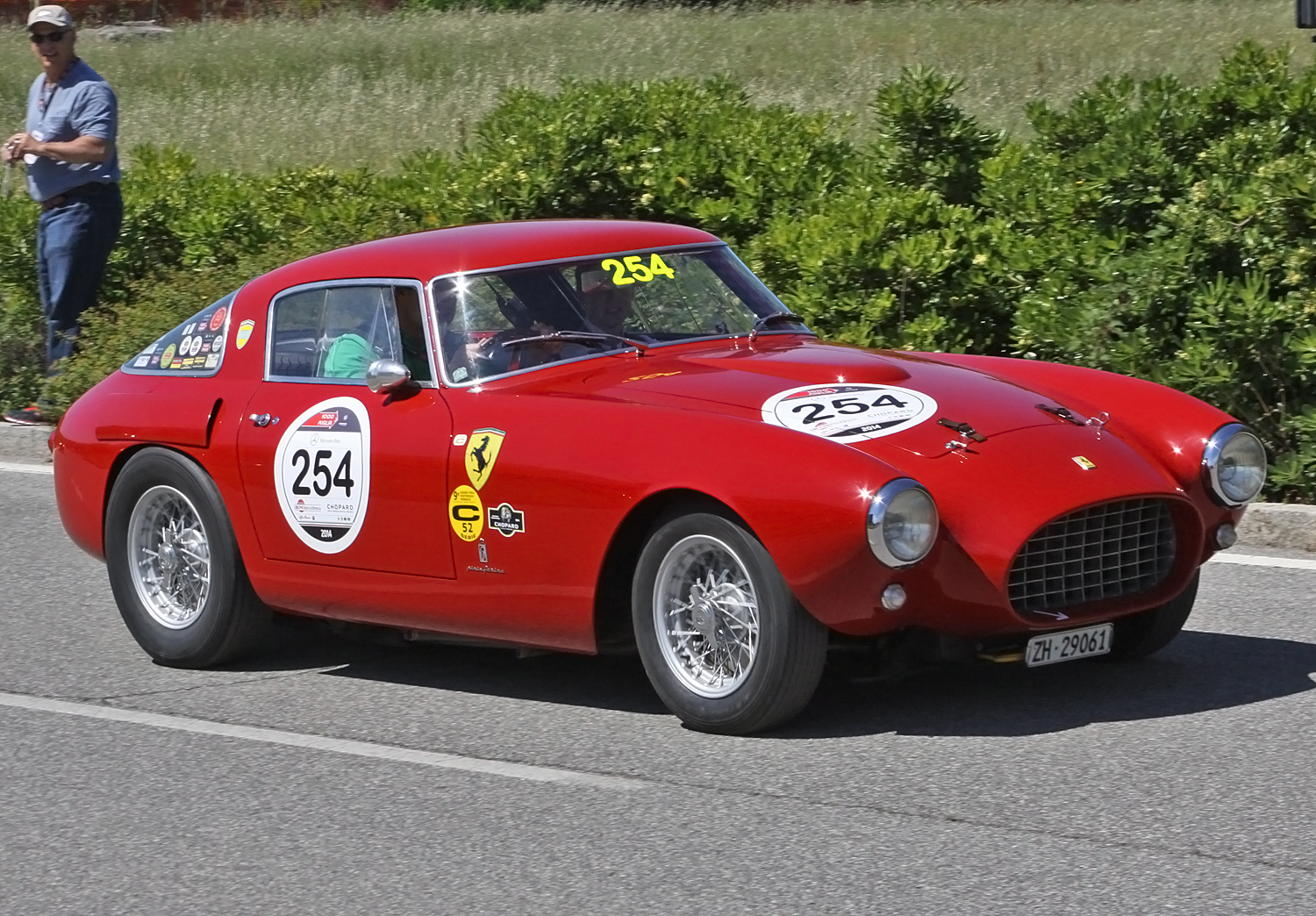 1953 Ferrari 250 MM Berlinetta Pinin Farina at the Mille Miglia 2014.